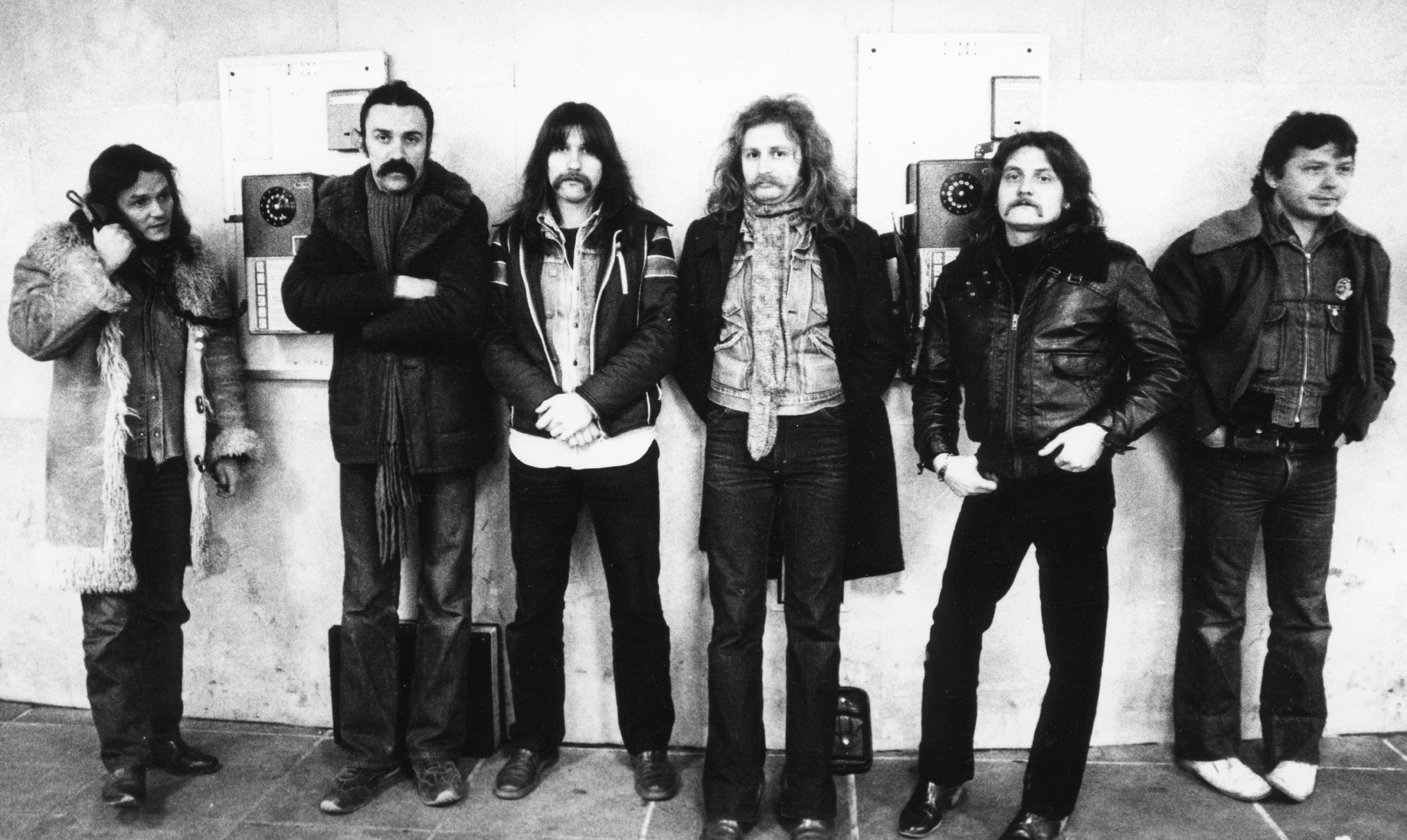 P. Mobil együttes. Tunyogi Péter, Schuszter Lóránd, Zeffer András, Sárvári Vilmos, Kékesi László, Marecky István a Nyugati (Marx) téri aluljáróban. Location: Hungary, Budapest Tags: pop music, telephone, leather jacket, fashion, coat, moustache, band Title: P. Mobil együttes. Tunyogi Péter, Schuszter Lóránd, Zeffer András, Sárvári Vilmos, Kékesi László, Marecky István a Nyugati (Marx) téri aluljáróban.